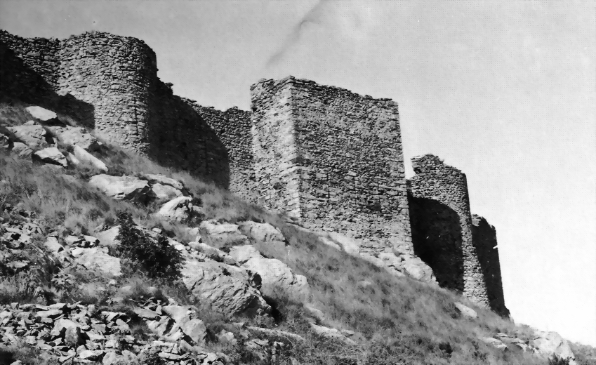 Castell de Verdera (Alt Empordà), muralla de 1283.